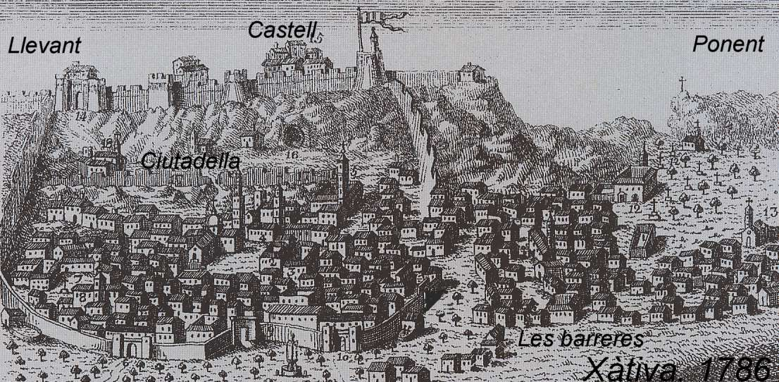 Xàtiva